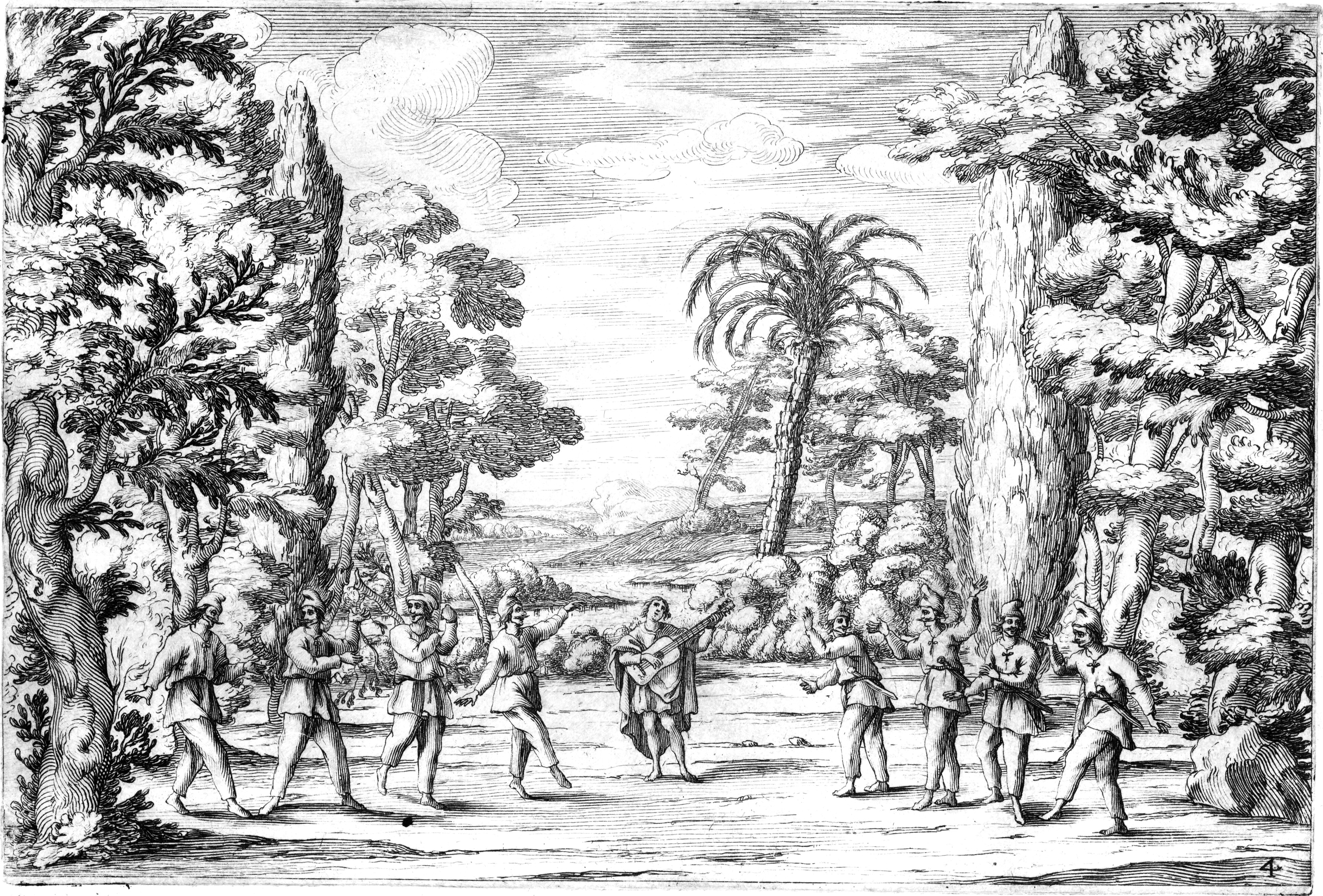 Stefano Landi - Il Sant'Alessio - Rome 1634 - Plate 4 without proscenium